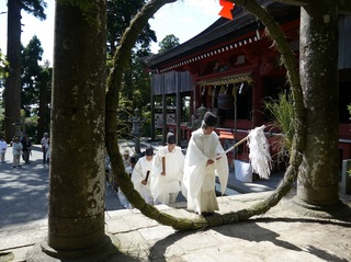 夏の大祓い